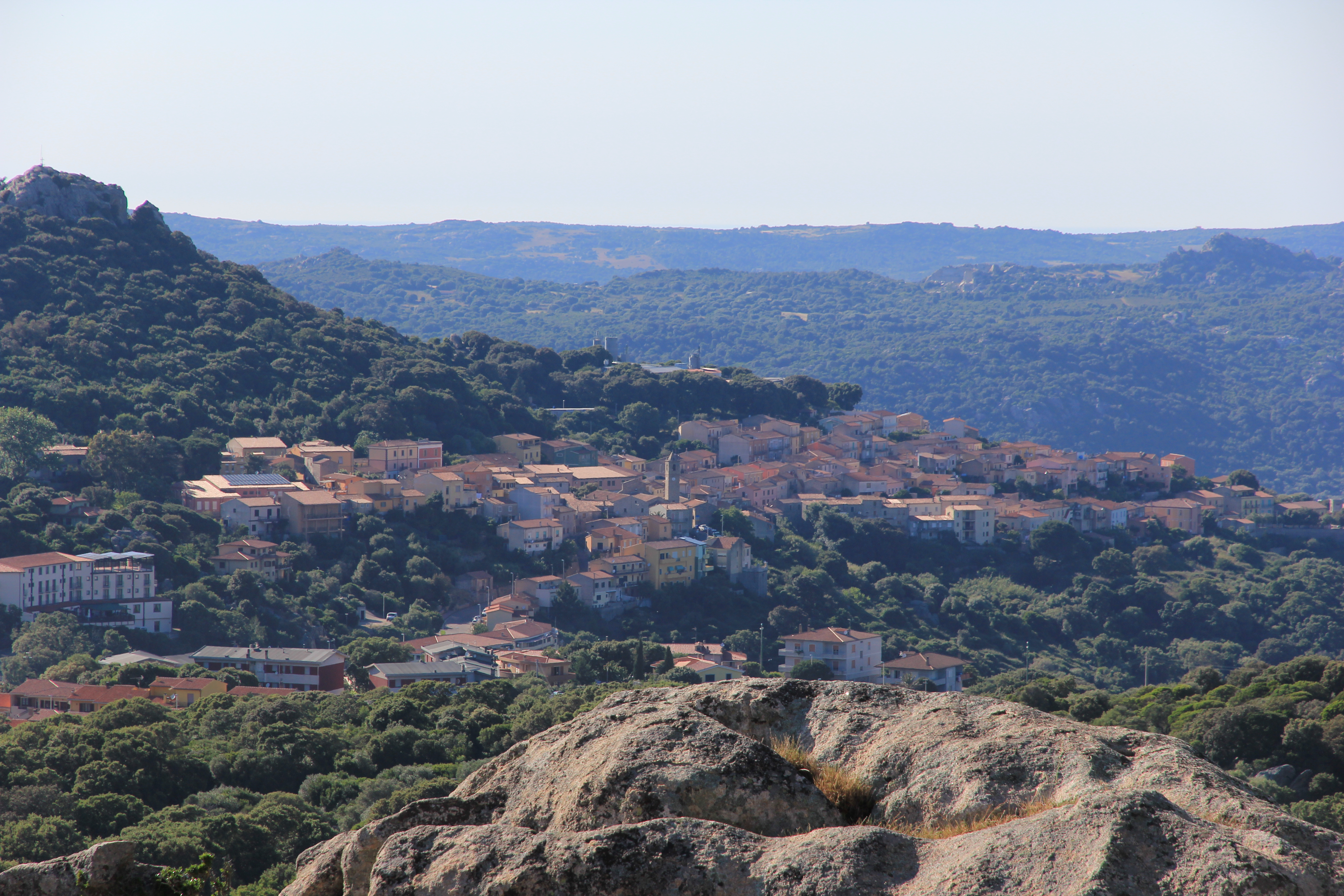 Luogosanto - Panorama